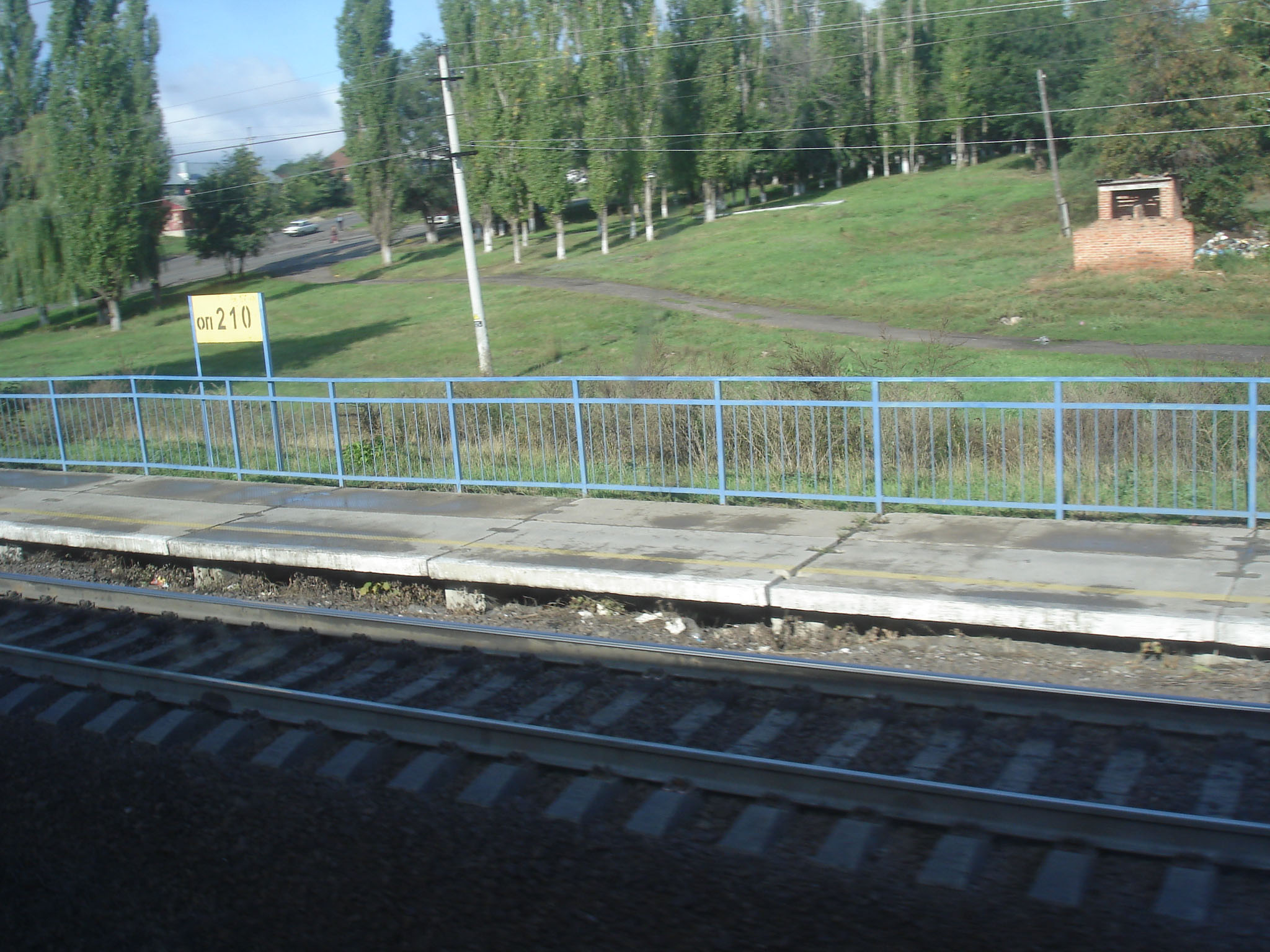 ОП 210 км ЮВЖД